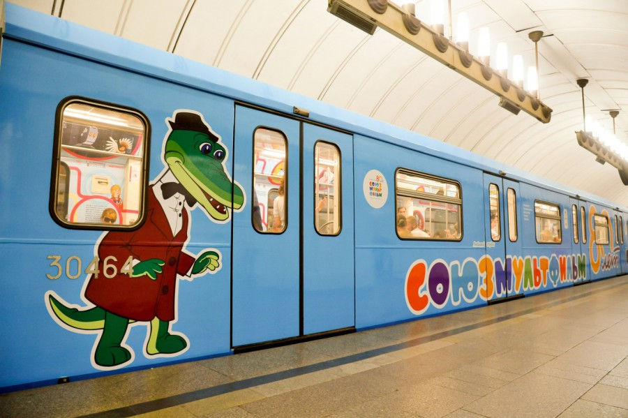 Оформление борта поезда